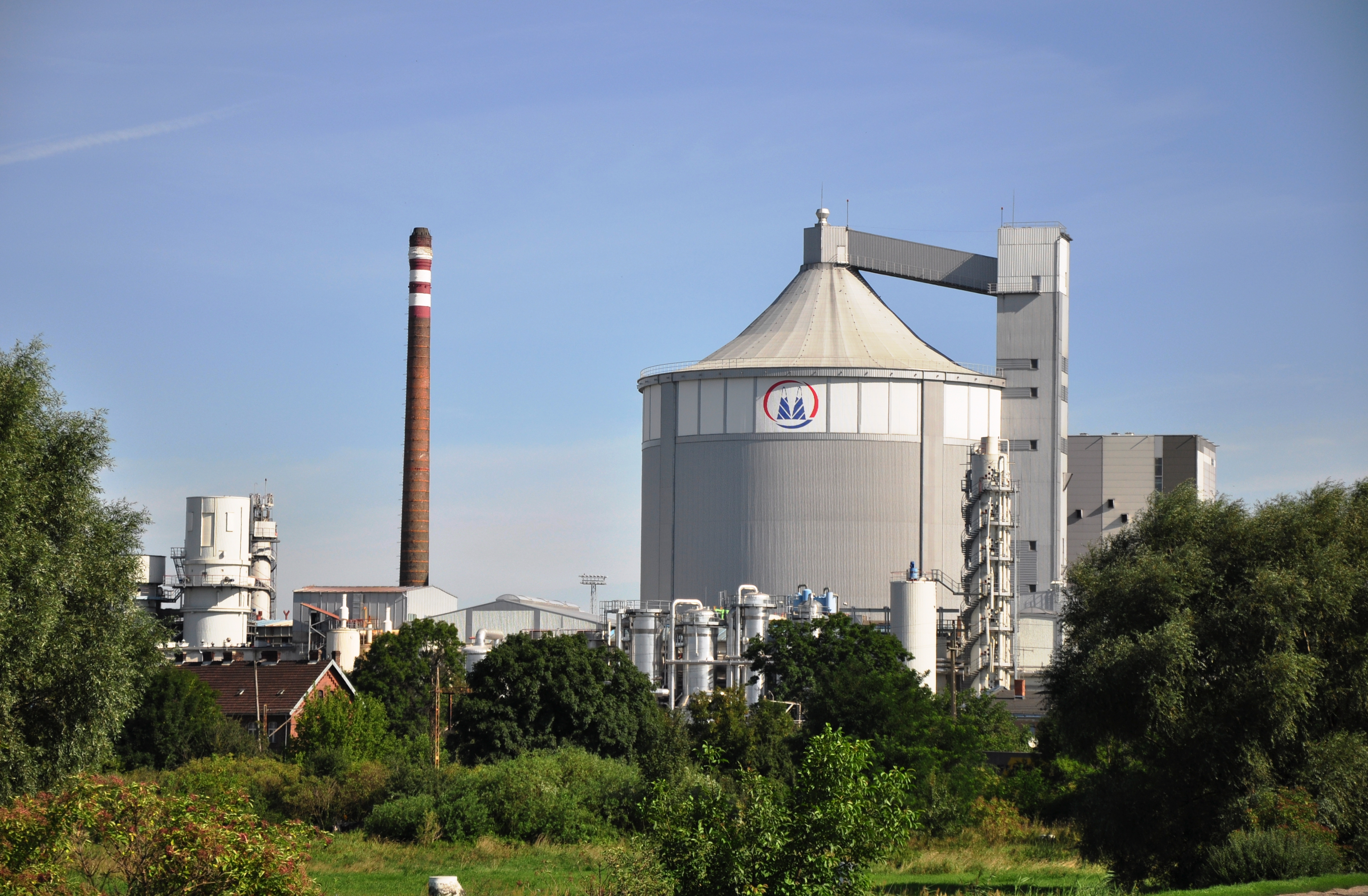 Sroda, Zuckerfabrik